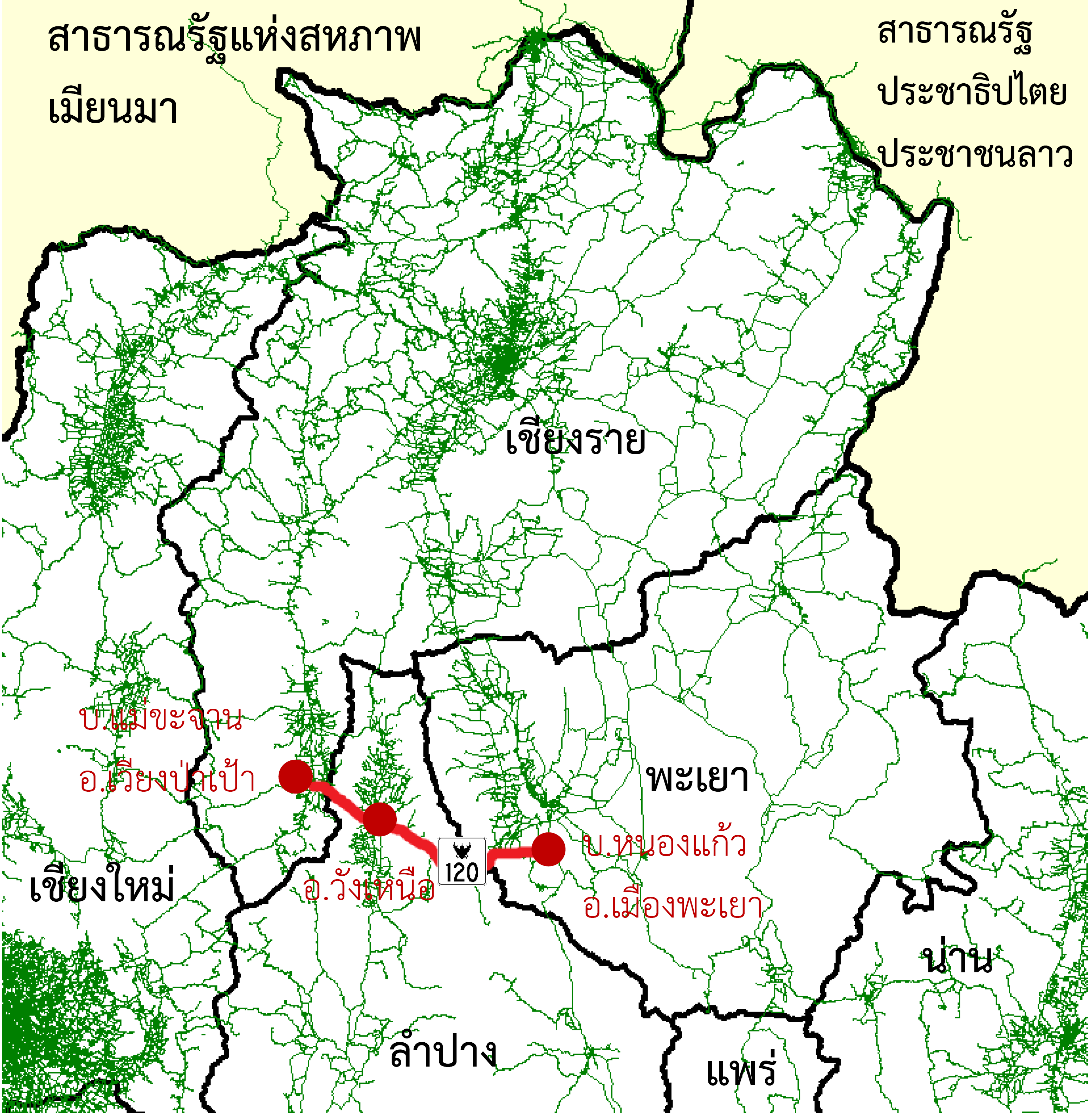 Thailand Highway 120